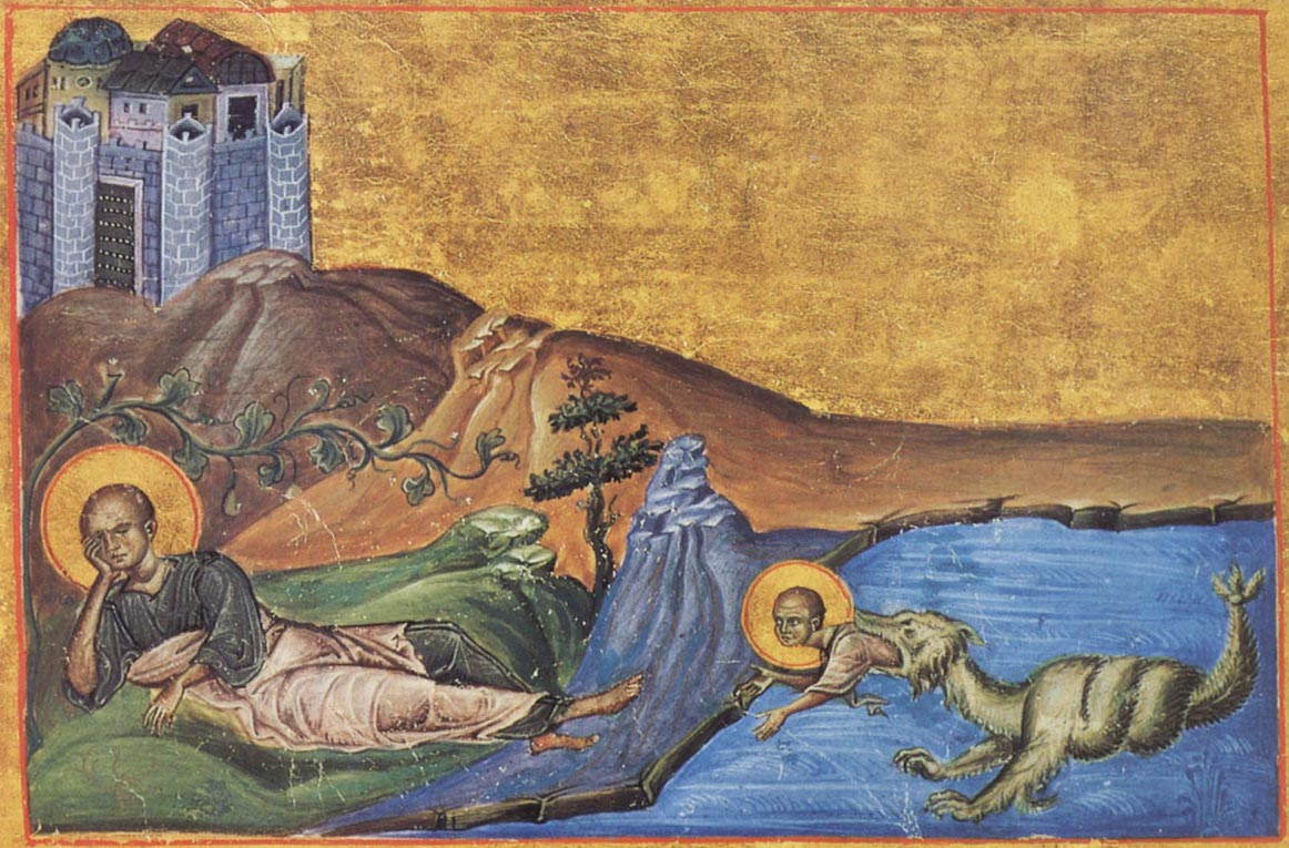 Иона. Миниатюра из Минология Василия II (976-1025). Ватиканская библиотека. Рим.